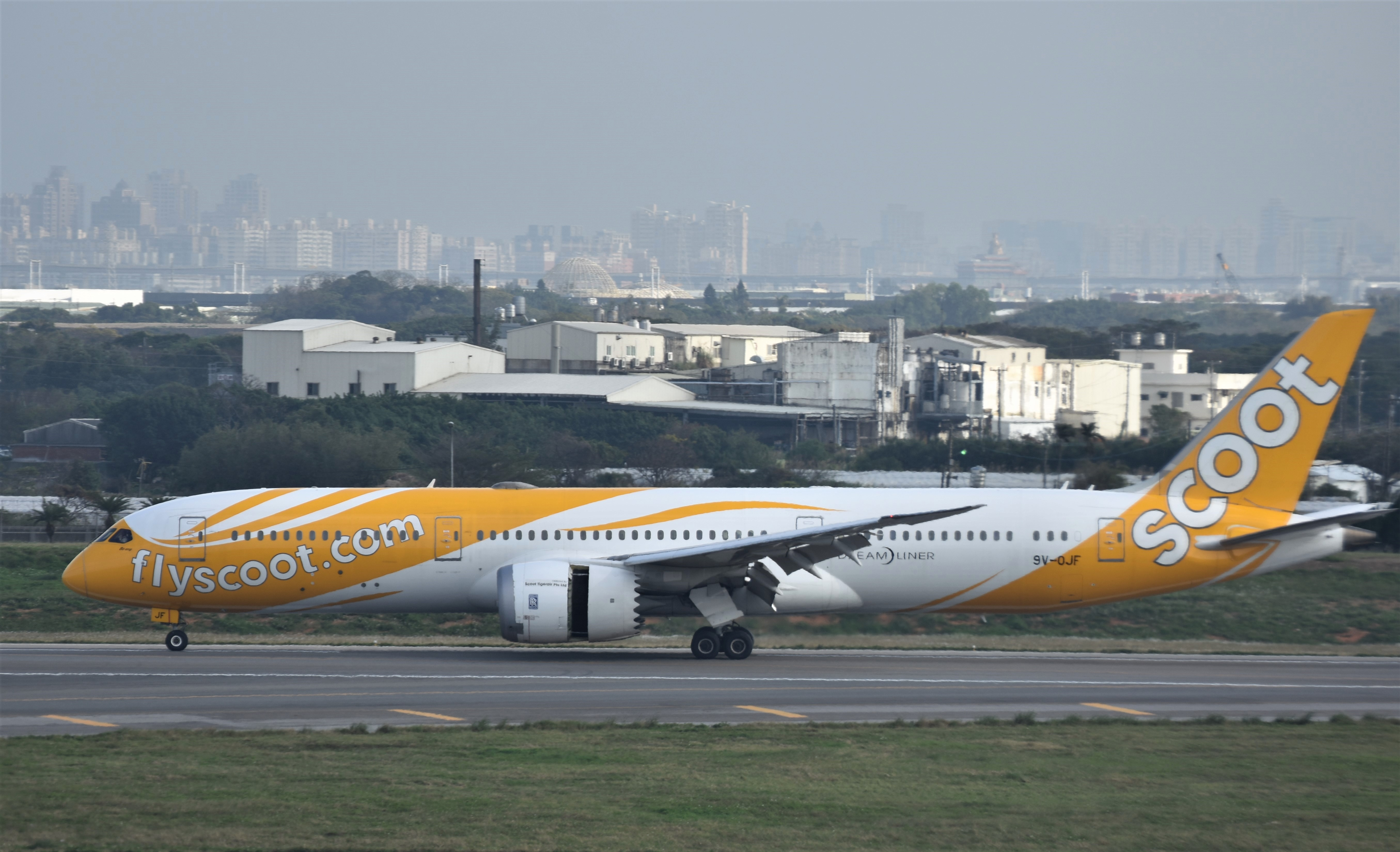 酷航於桃園國際機場